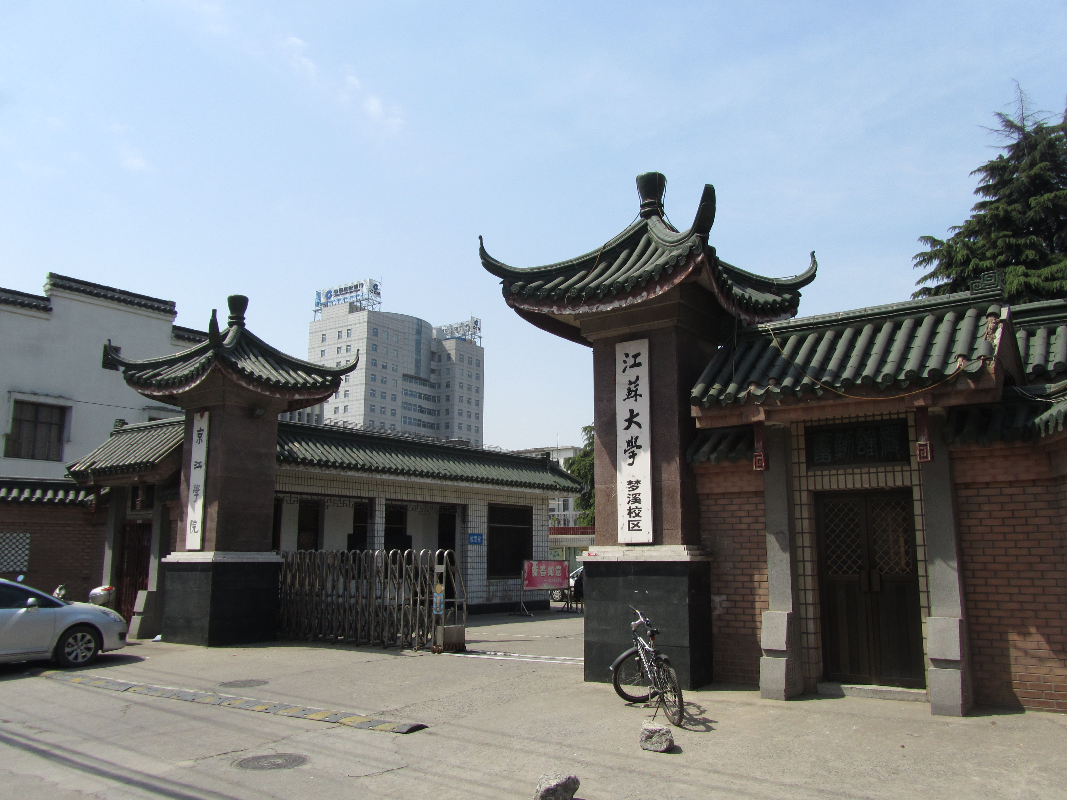 位于梦溪园巷内的江苏大学梦溪校区大门。